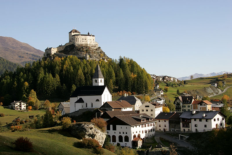 Tarasp